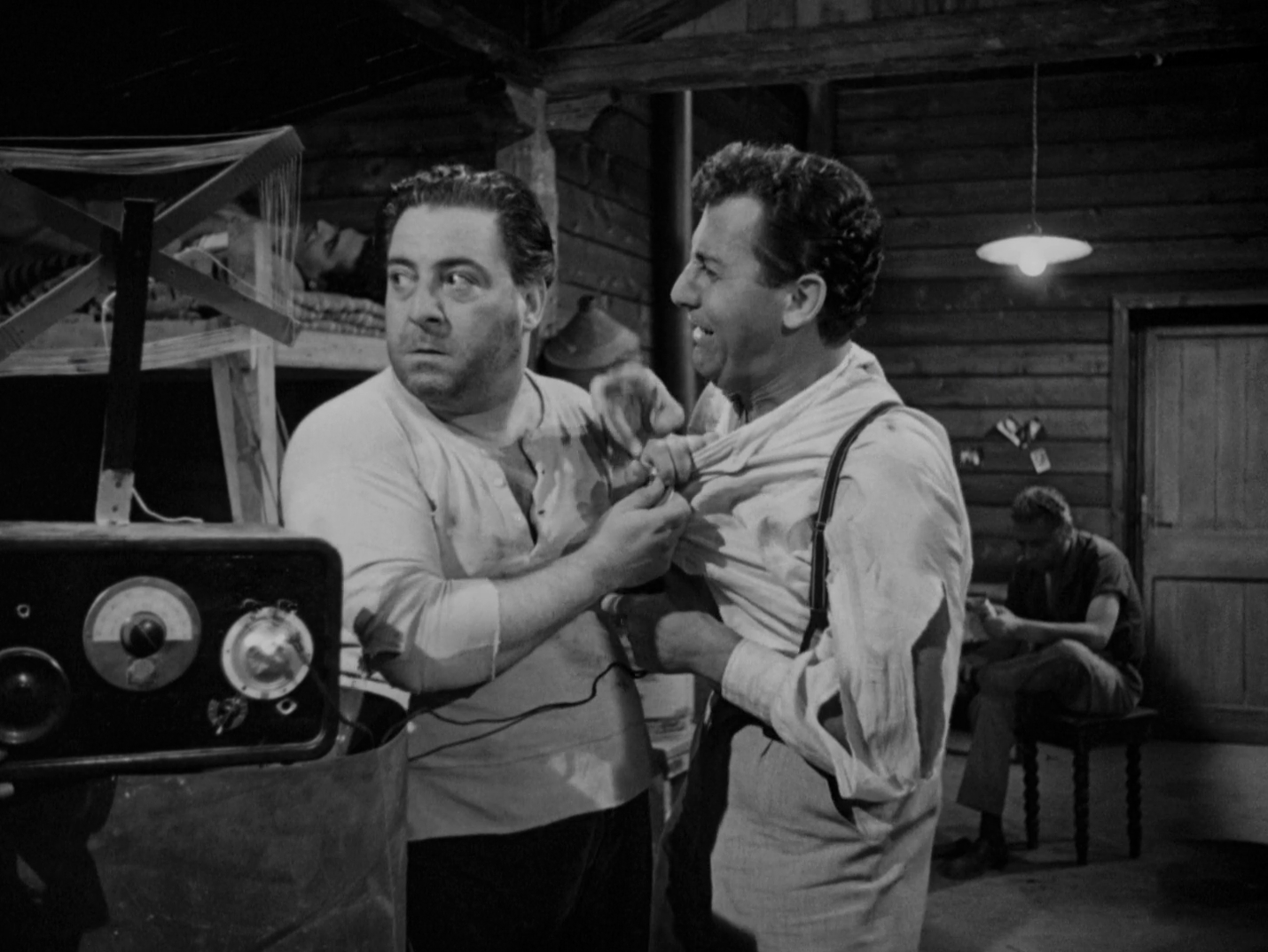 scena dal film Un americano a Roma